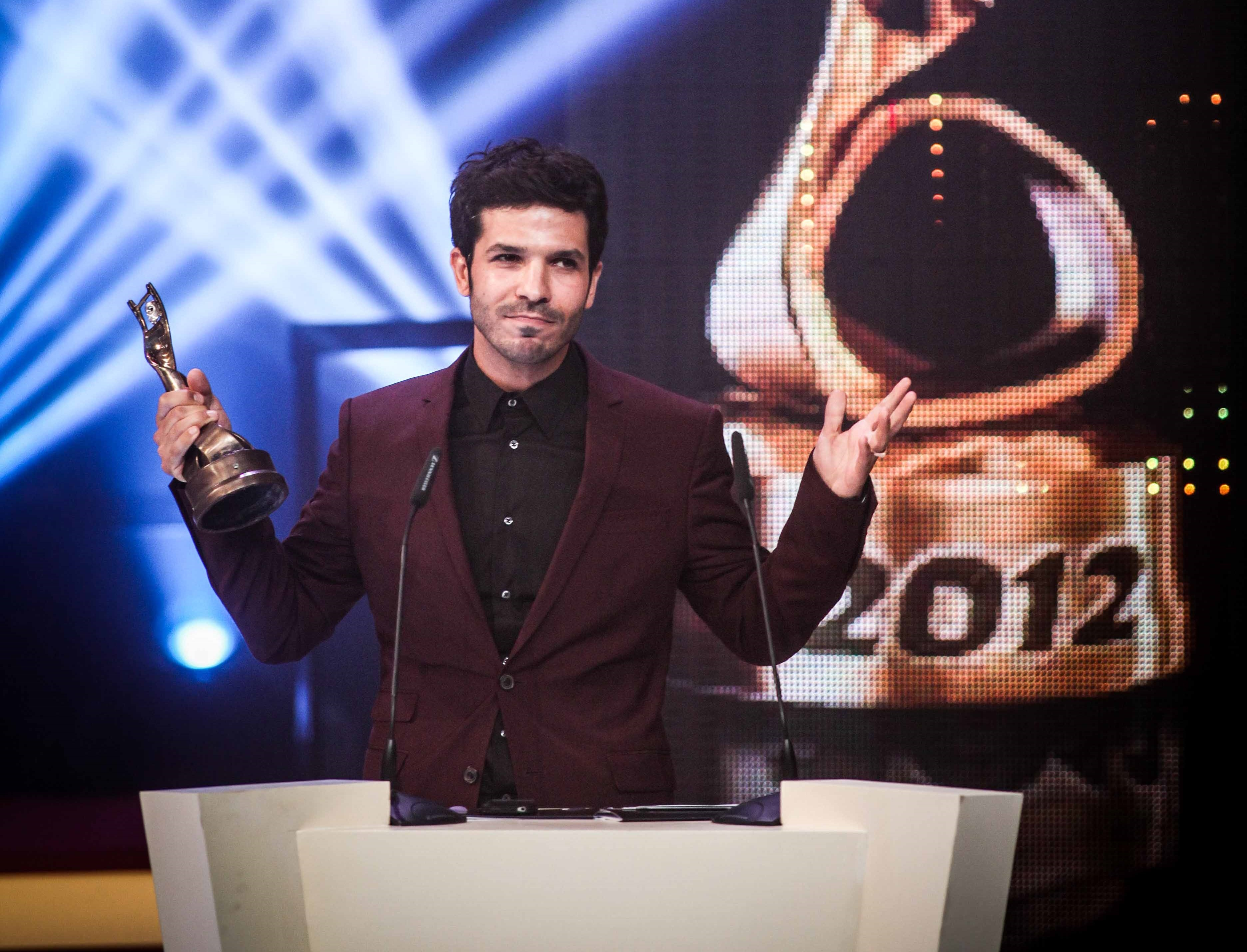 רועי אסף מקבל את פרס אופיר